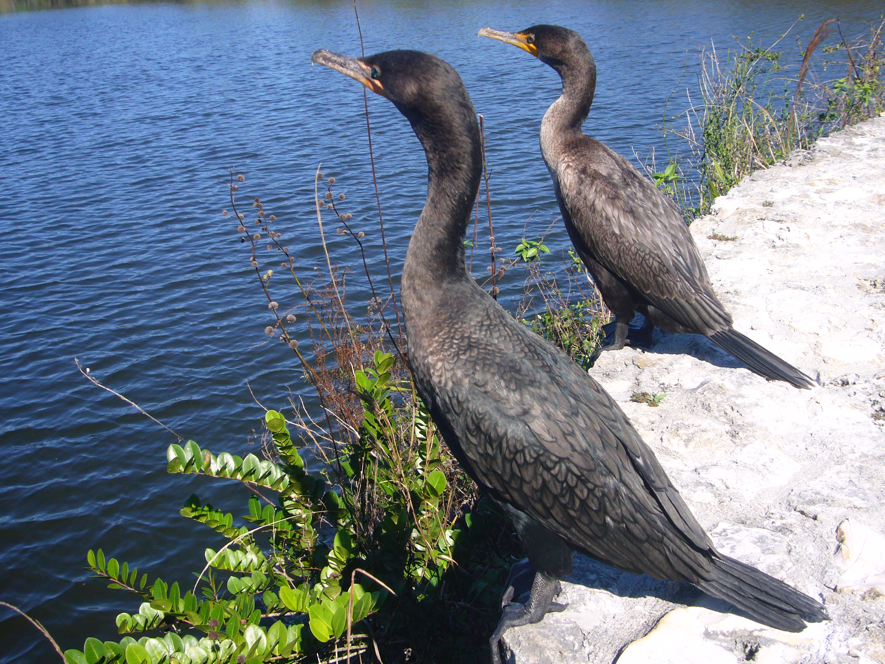 Ушастый баклан (Phalacrocorax auritus). Национальный парк Эверглейдс, Флорида, США